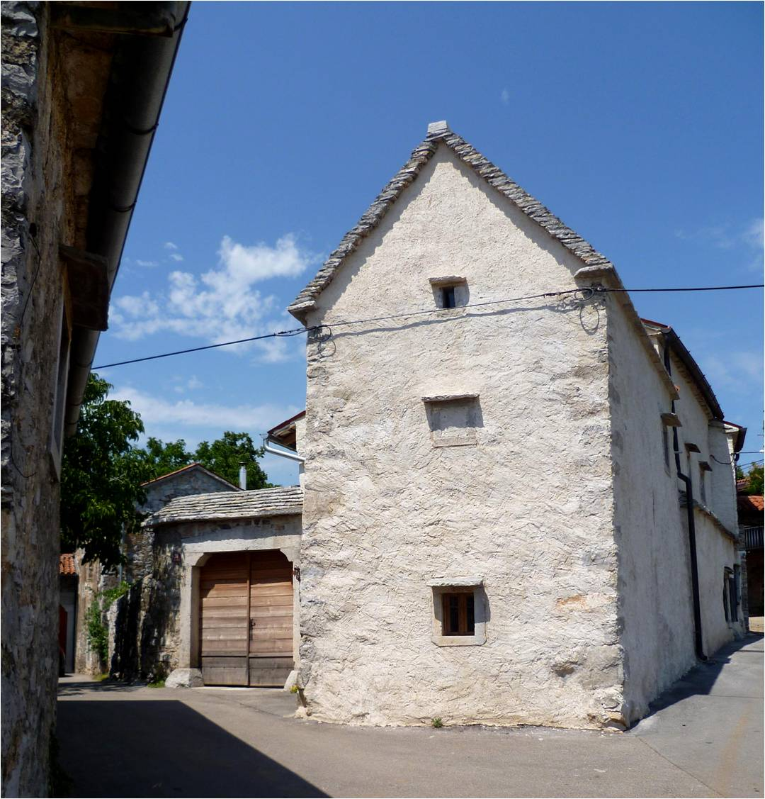 Rural architecture of Slovenia. A "porton" is leading into the inner courtyard of an old farmhouse on the Karst plateau.